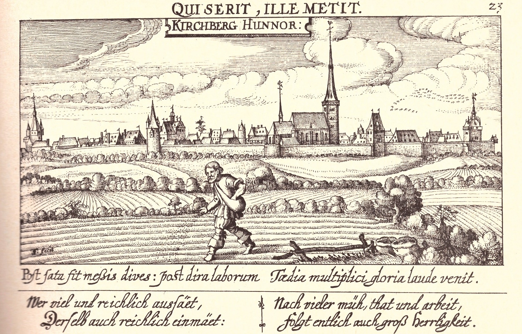 Kirchberg, gravure de Meisner-Kieser